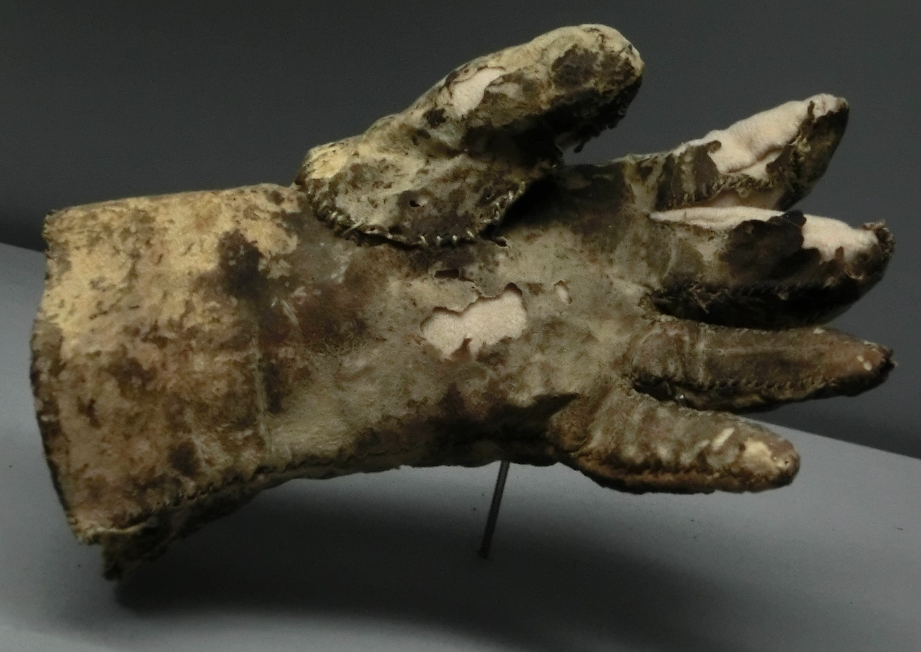 Deutschland - Bayern - Kempten: Ausstellung "Mühlberg-Ensemble im Allgäu-Museum. - "Fingerhandschuh (15./16. Jh.); Das weiche Ziegenleder des Handschuhs wurde in der Verfüllung des Fehlbodens von Insekten und Nagetieren beschädigt. Dennoch sind seine Form und Zierlichkeit gut zu erkennen."